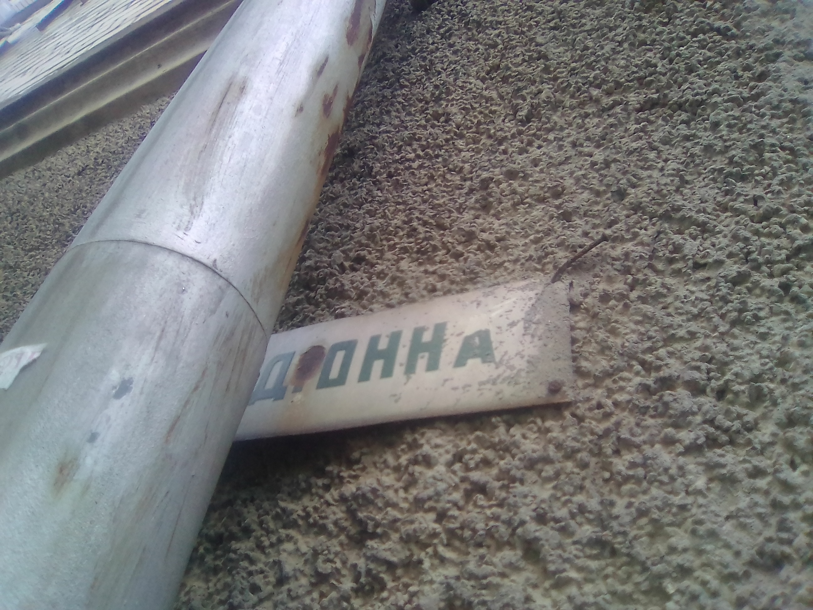 Збільшене зображення правої частини таблички з колишньою назвою вулиці "Стадіонна" на будинку № 5 по вул. Бузника